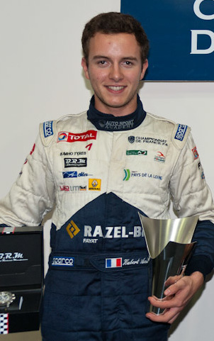 Photographie d'Anthoine Hubert, Jules Gounon et Tristan Viidas, en Formule 4.